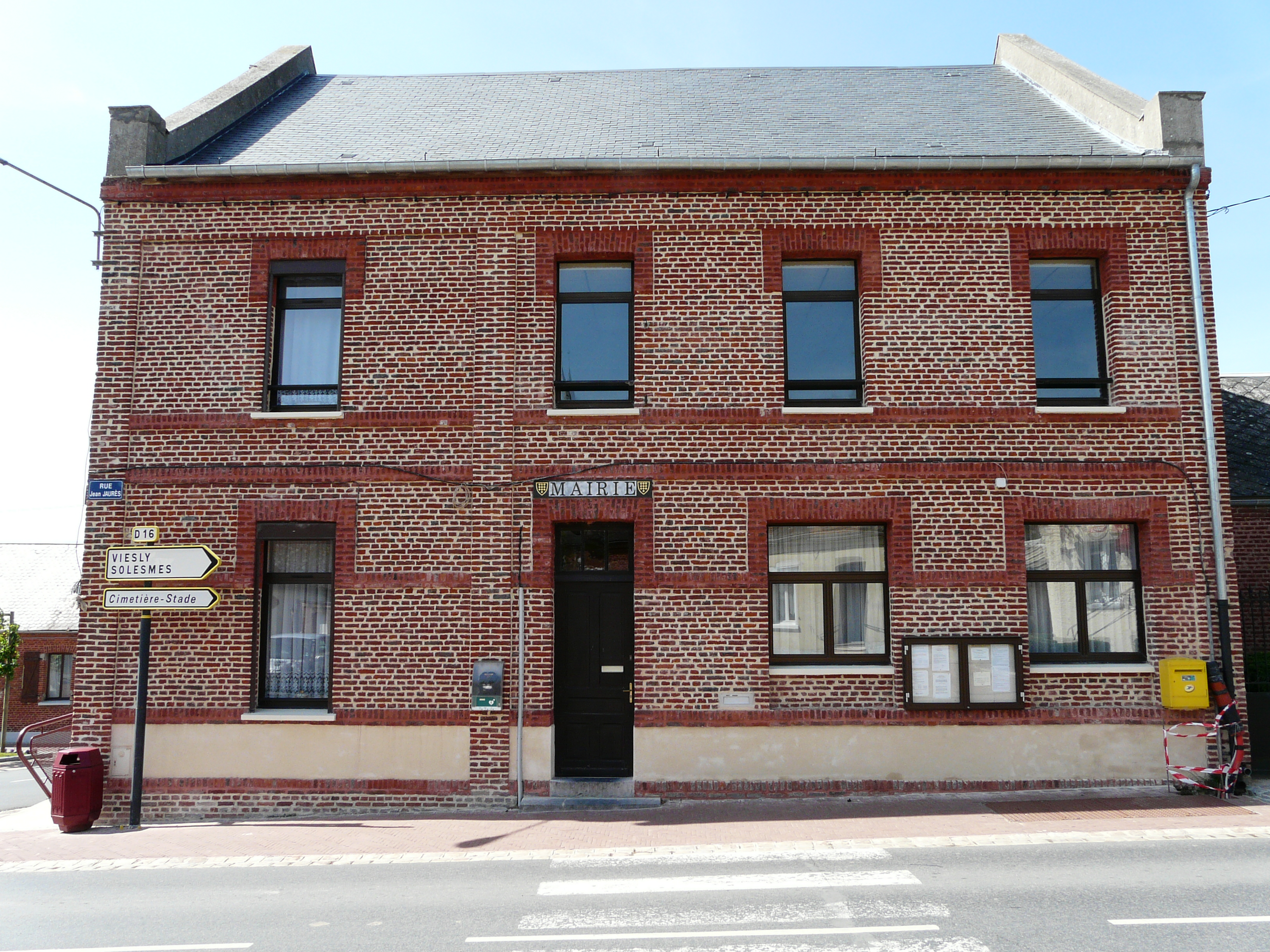 Mairie de Béthencourt (Nord, France)